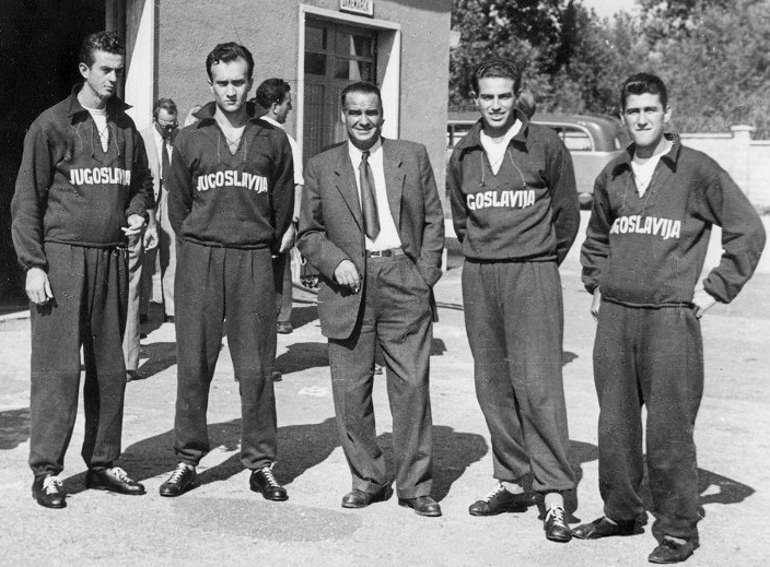 Left-right: Petar Šegvić, Mate Trojanović, coach Davor Jelaska, Velimir Valenta, Duje Bonačić at the 1952 Olympics